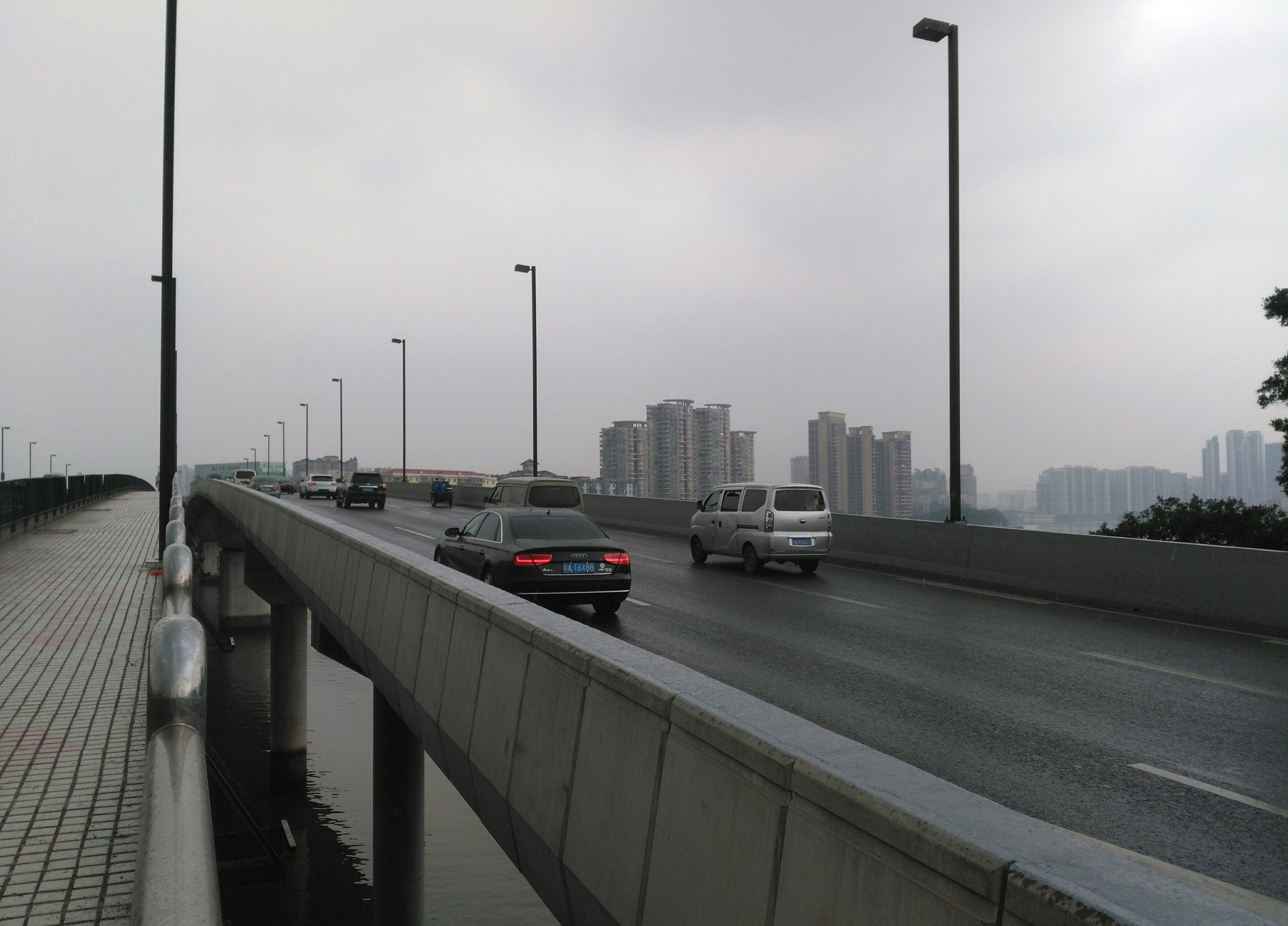 粵語: 金沙洲大桥係2015年扩建完成嘅新桥，呢张相系从旧桥人行通道靠近金沙洲果边嘅上桥位度拍嘅。